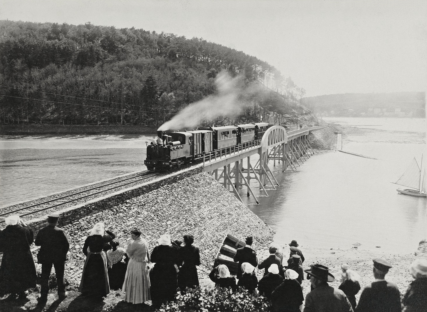 Inauguration de la ligne de chemin de fer Morlaix-Primel au Dourduff-en-Mer le 30 avril 1912 (photographie dont l'auteur est anonyme, Musée de Bretagne)